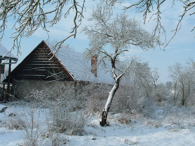 Stará farská záhrada